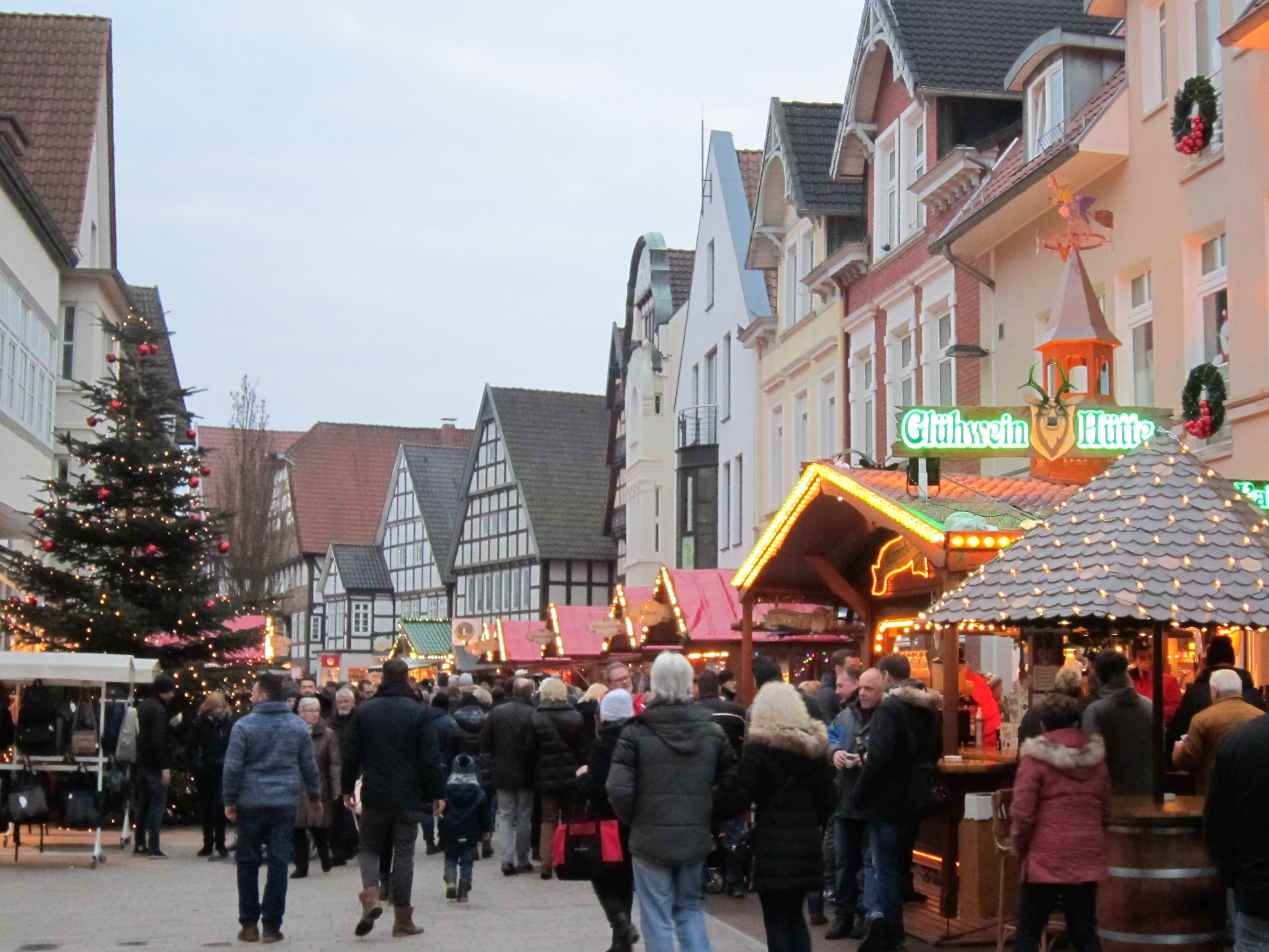 "Bad Salzufler Weihnachtstraum" in der Langen Straße